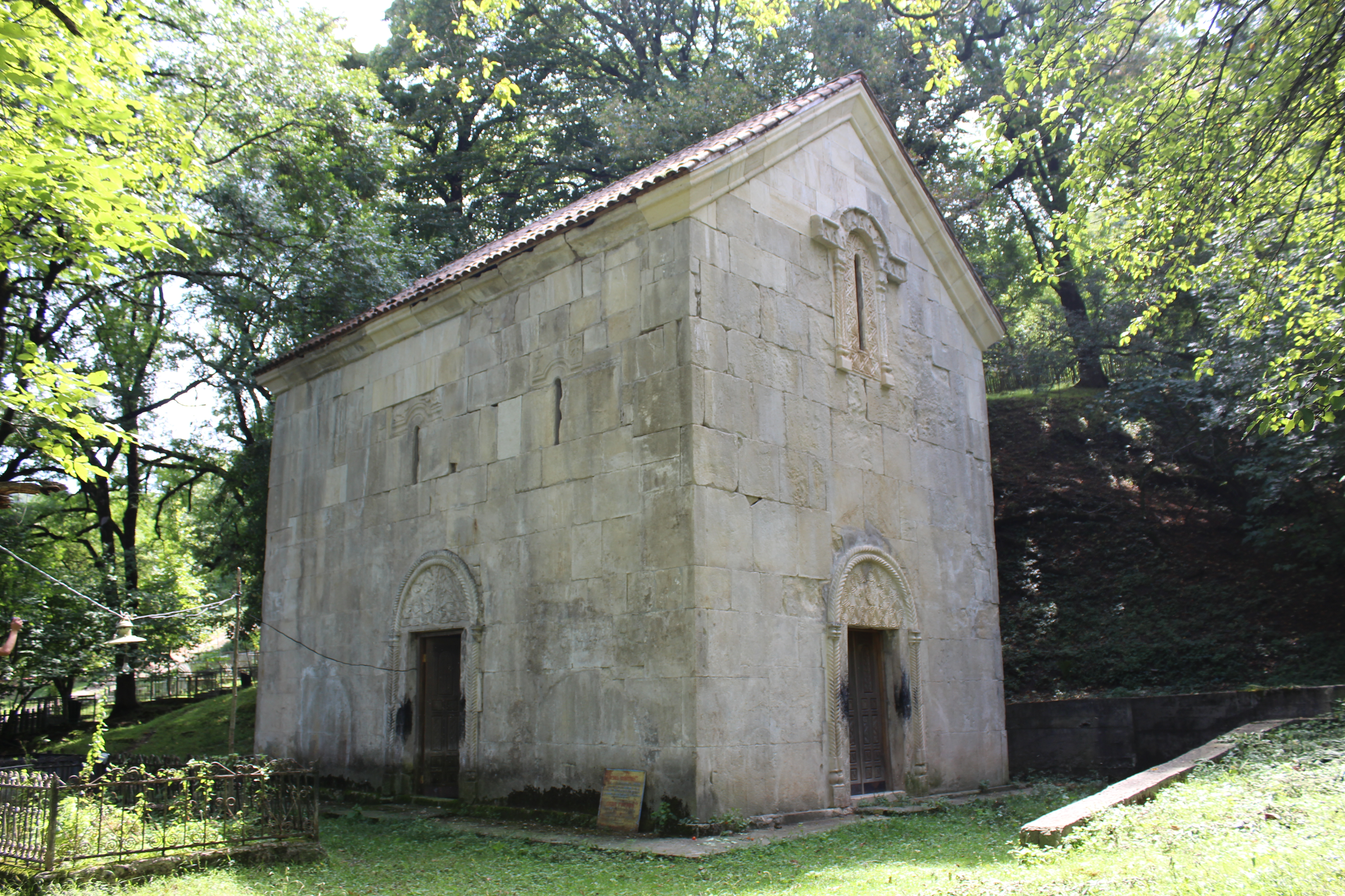 ეხვევის ღვთისმშობლის ეკლესია, XI საუკუნის დამდეგი.